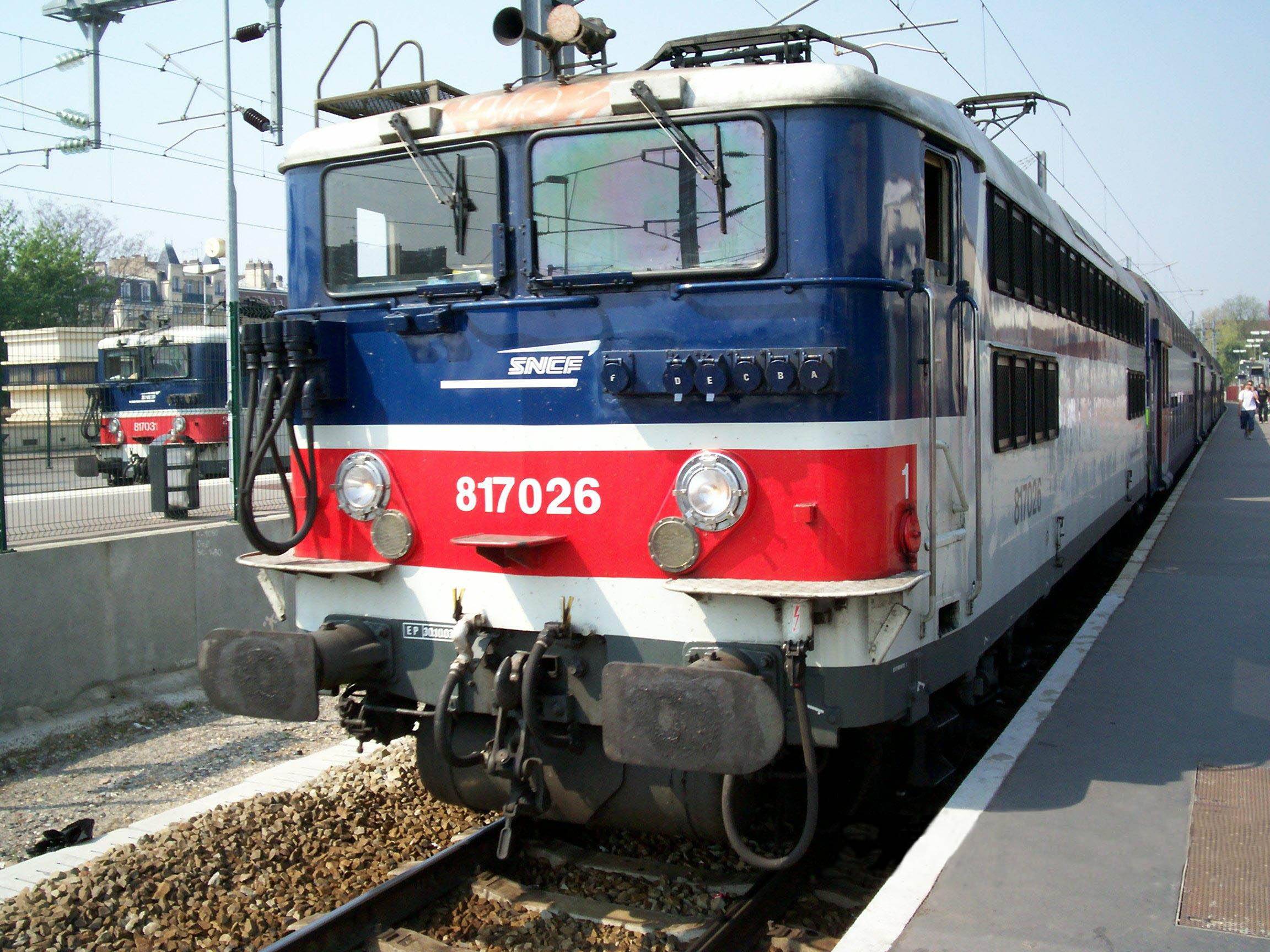 Locomotive B17026 en gare d'Argenteuil